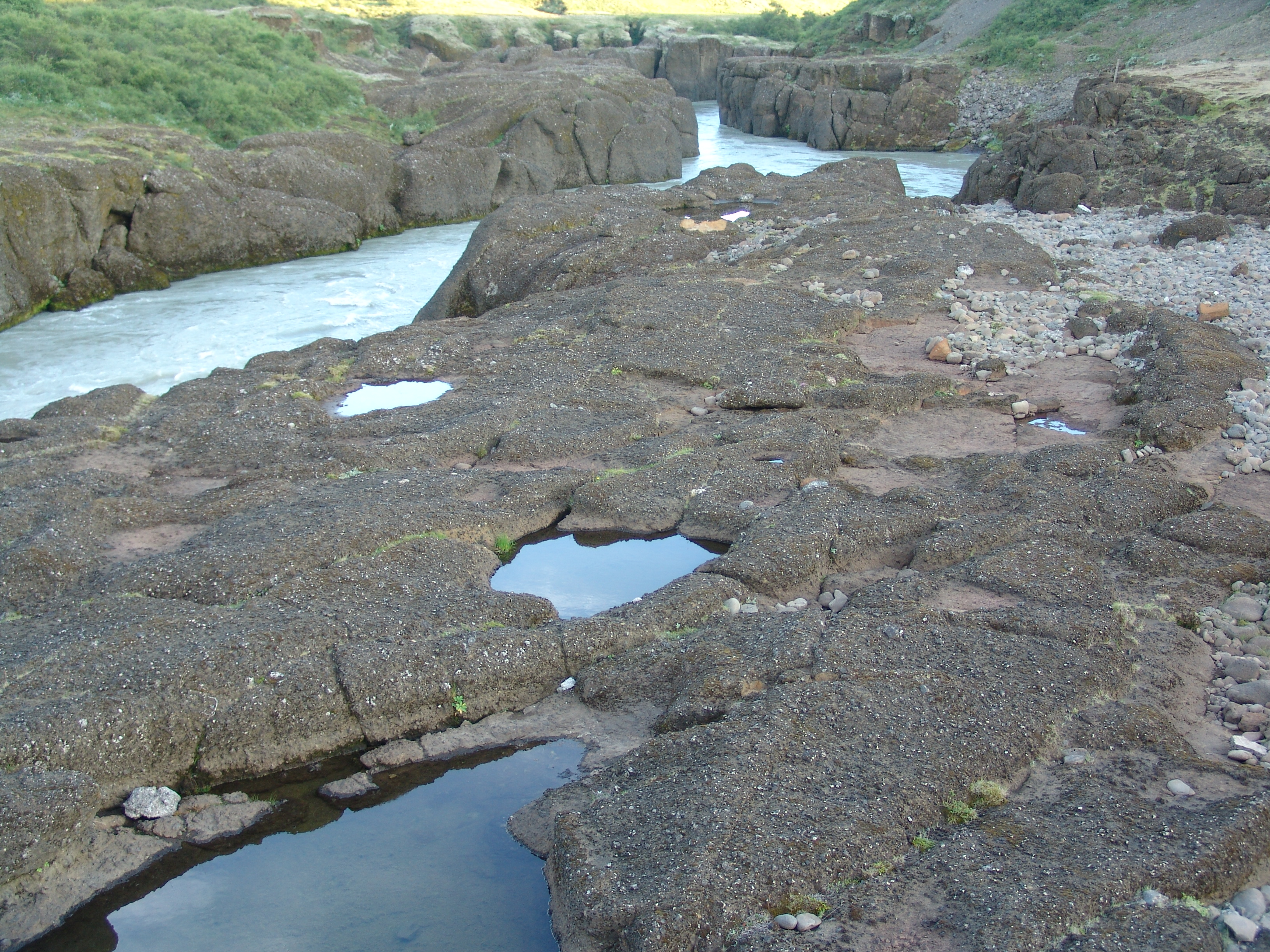 Island, Landschaft.